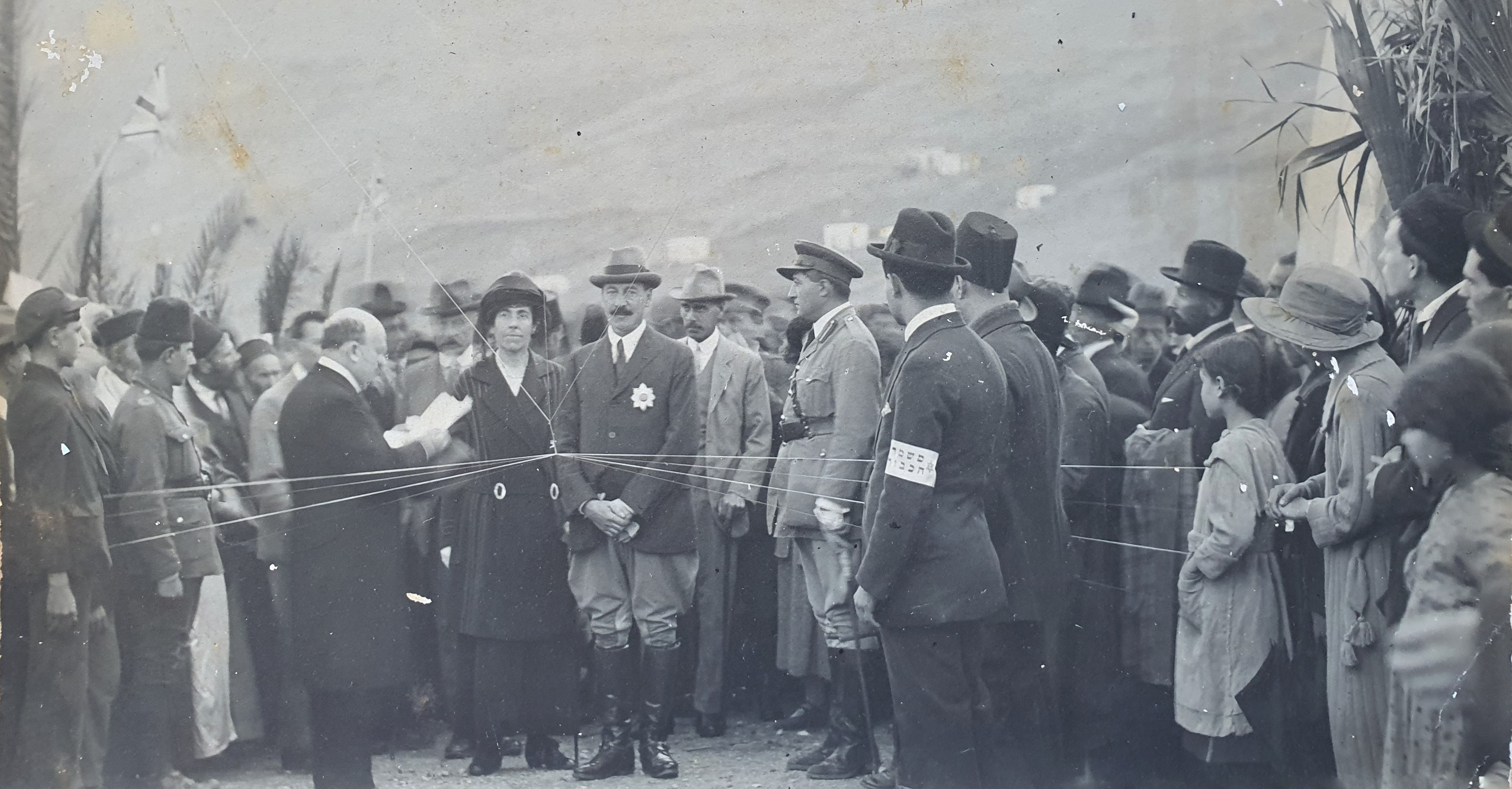 ברוך בן-טובים, נשיא חברת "אחוזת בית" מקדם את פני הנציב העליון סר הרברט סמואל ורעייתו בהגיעם לטבריה. 26.11.1922